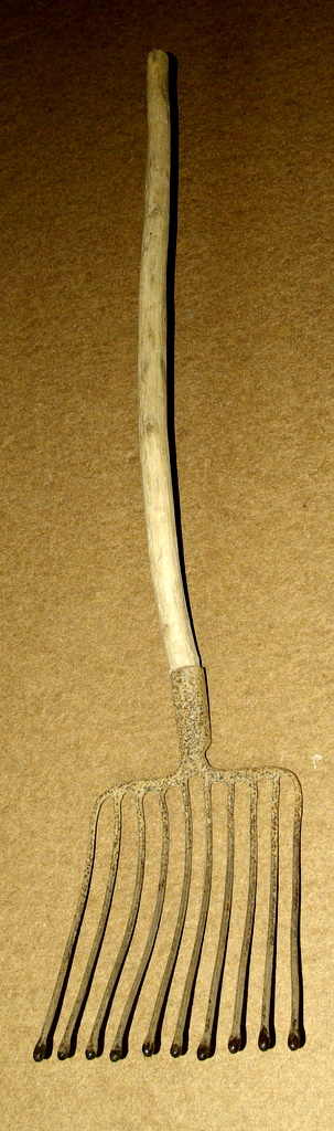 Kartoffelgabel